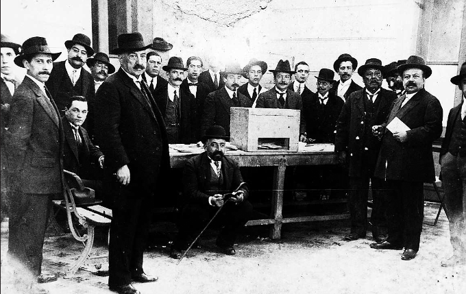 Chile. Elección presidencial de 1915 donde resultó ganador Juan Luis Sanfuentes